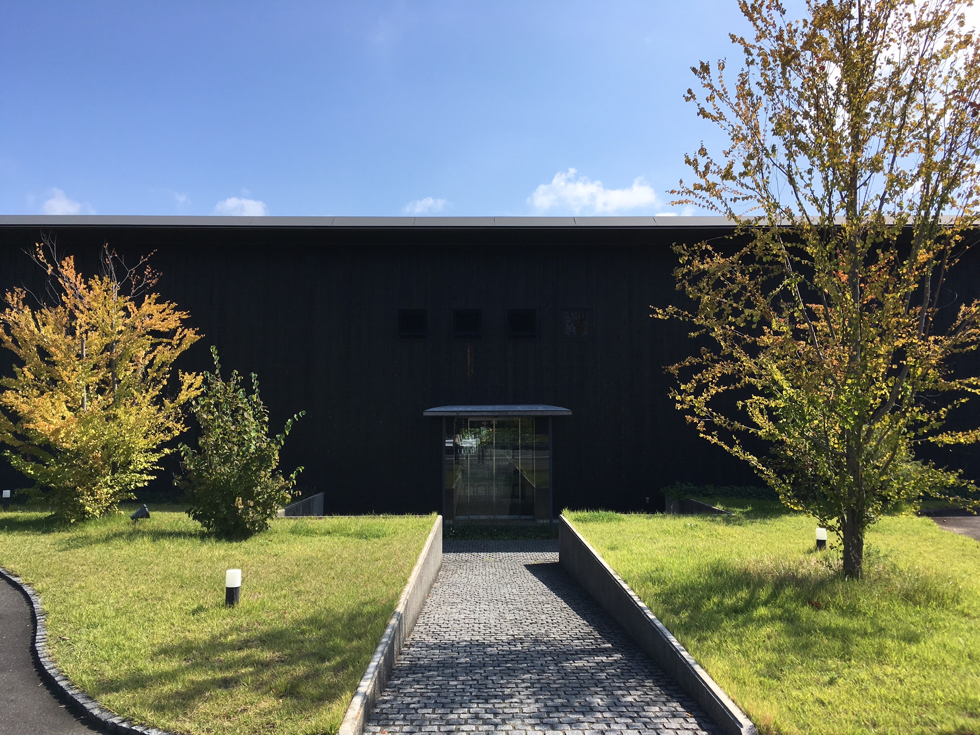 中村好文の作品